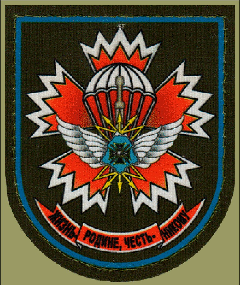 эмблема